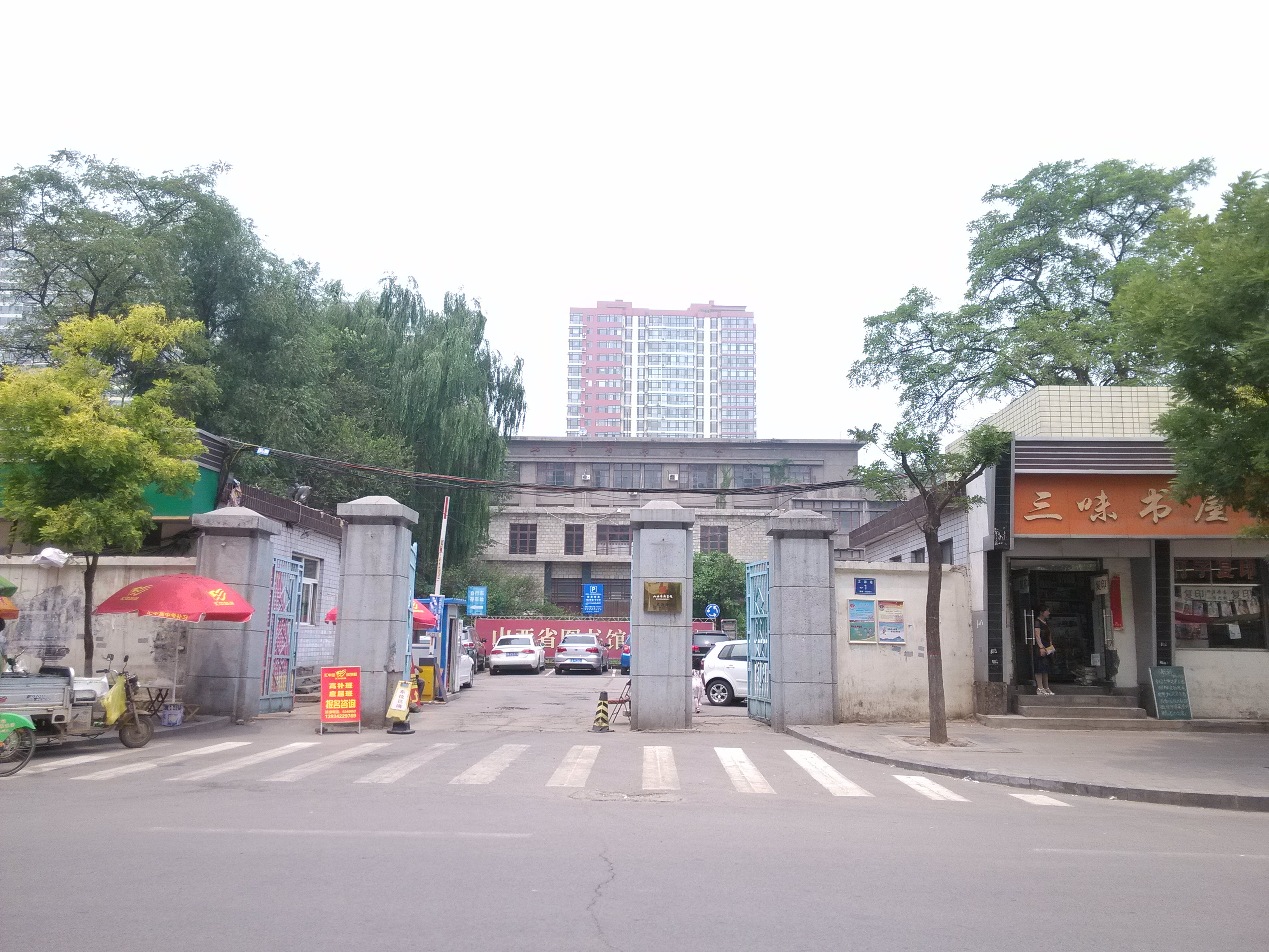 中文（中国大陆）: 山西省图书馆（文源馆）。摄于文源馆南侧。